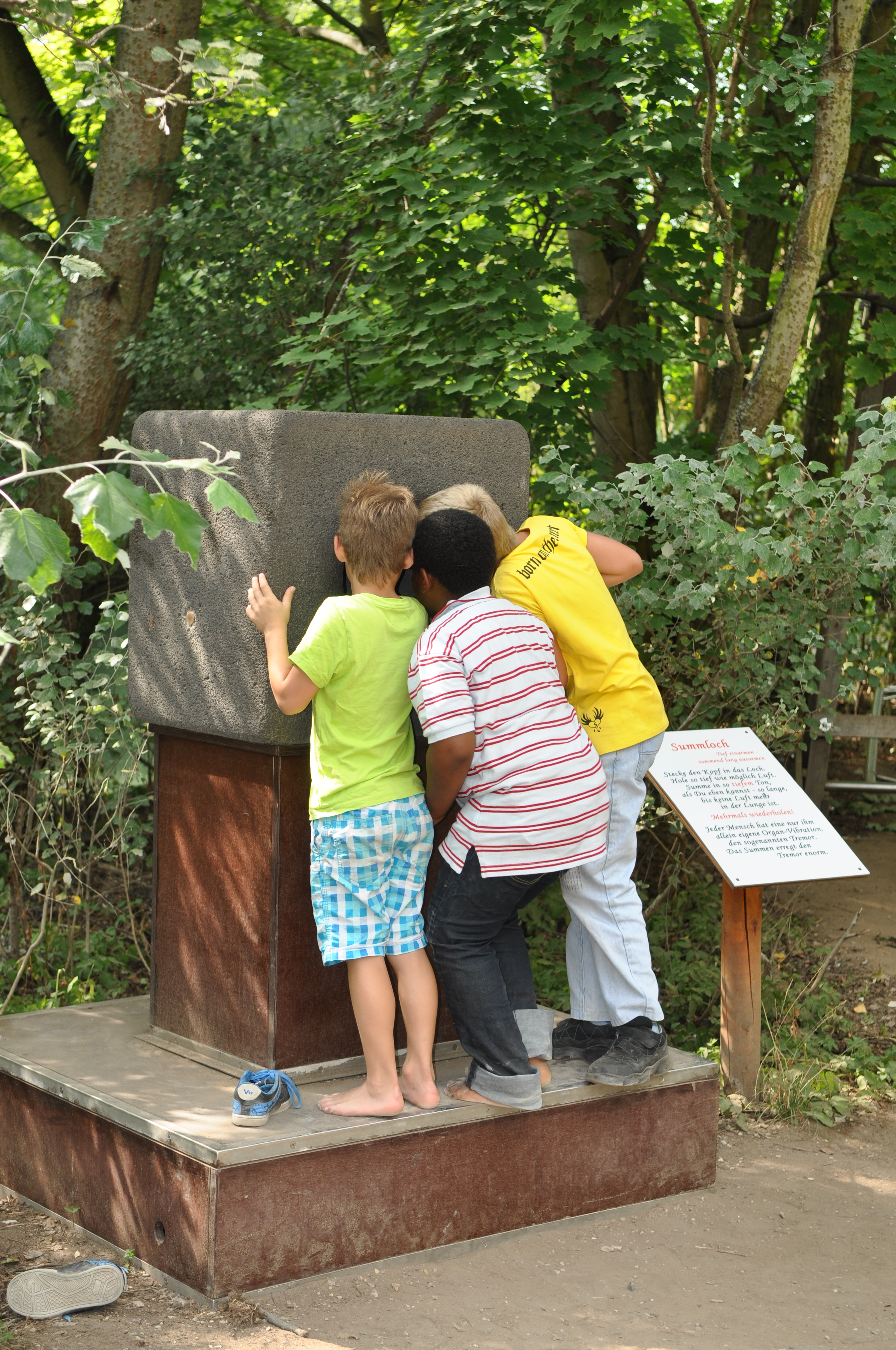 Summstein auf dem Erfahrungsfeld der Entfaltung der Sinne Nürnberg